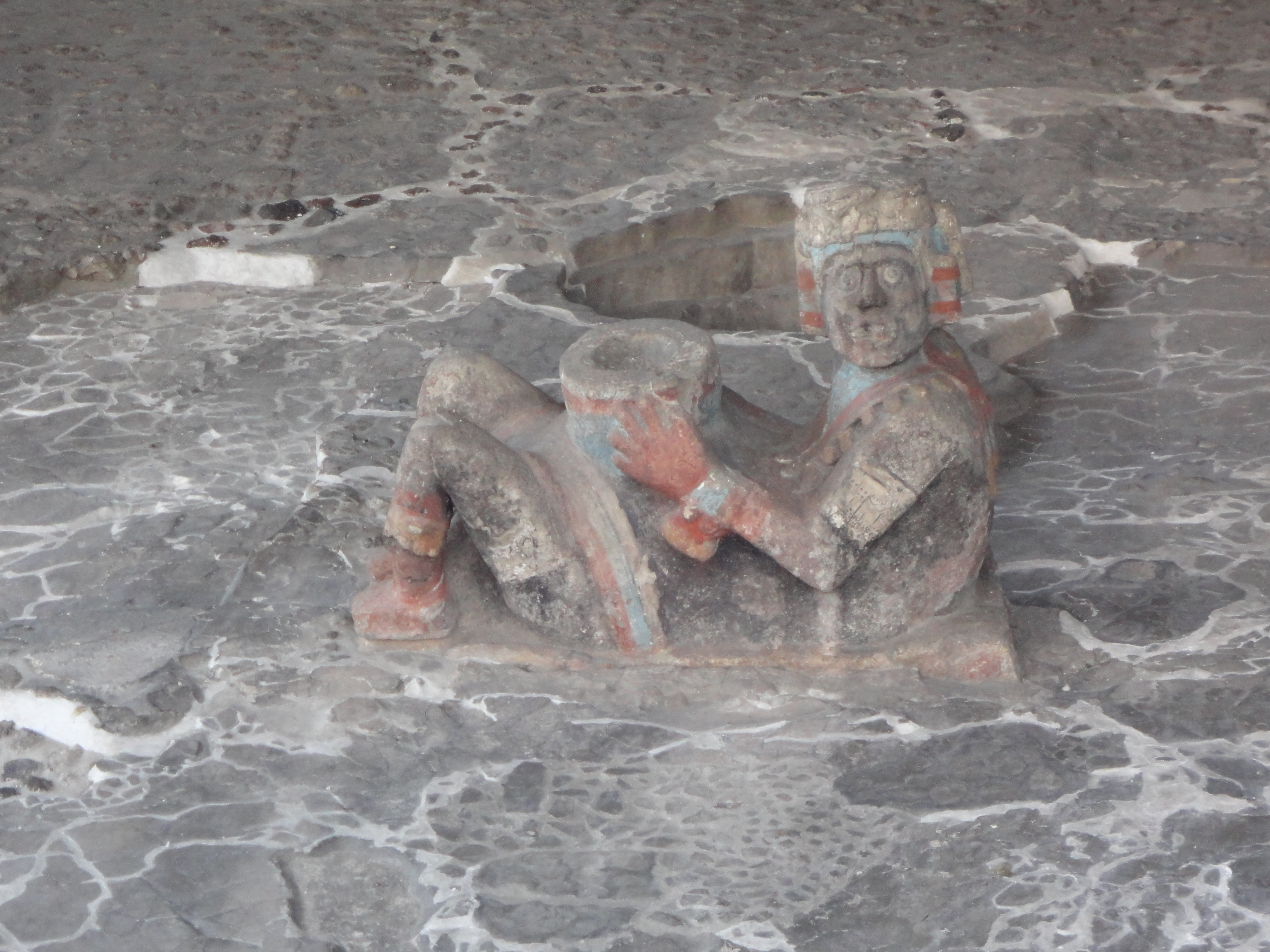 Chac mool en el Templo Mayor, Centro Histórico de la Ciudad de México.